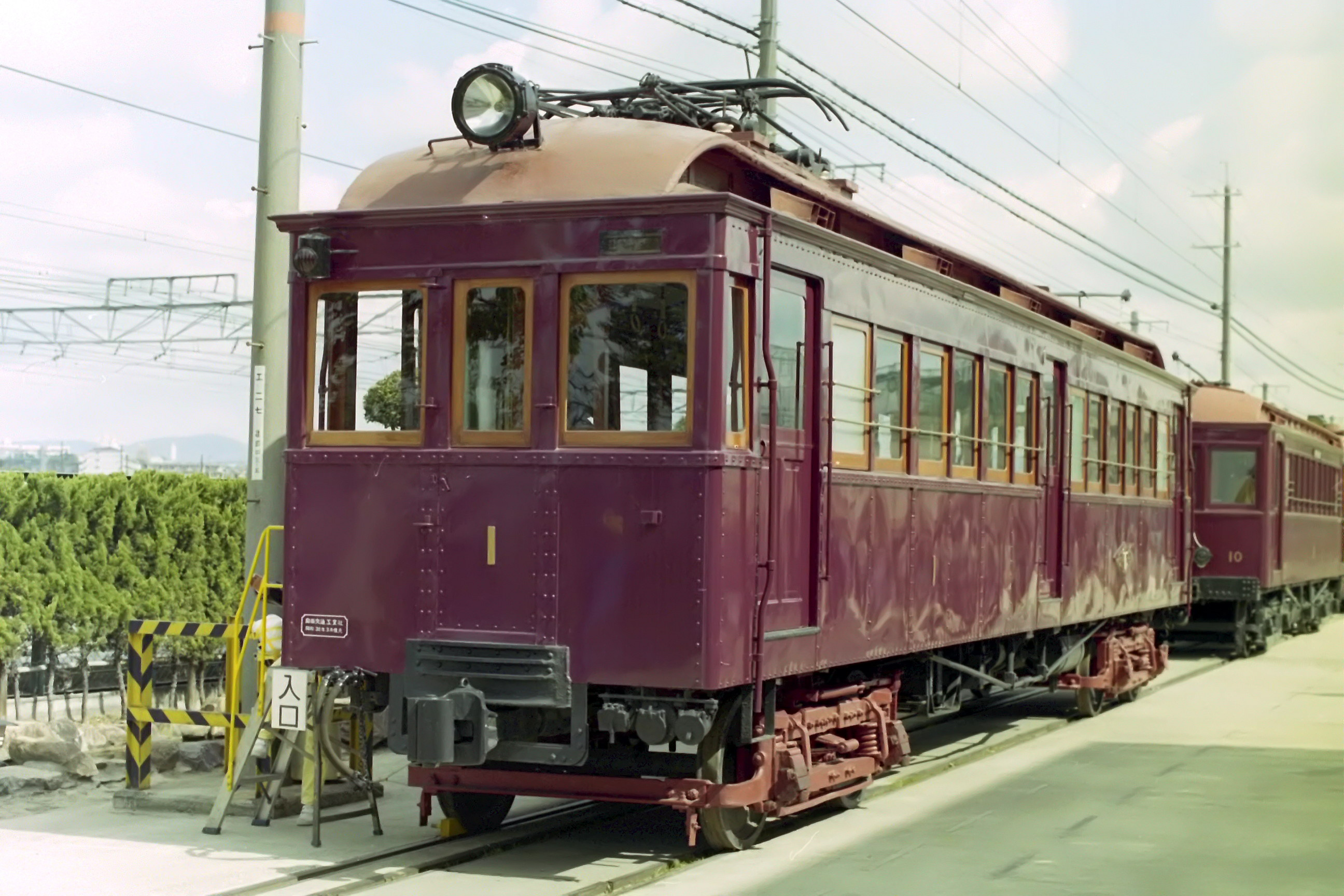 阪急1形保存車